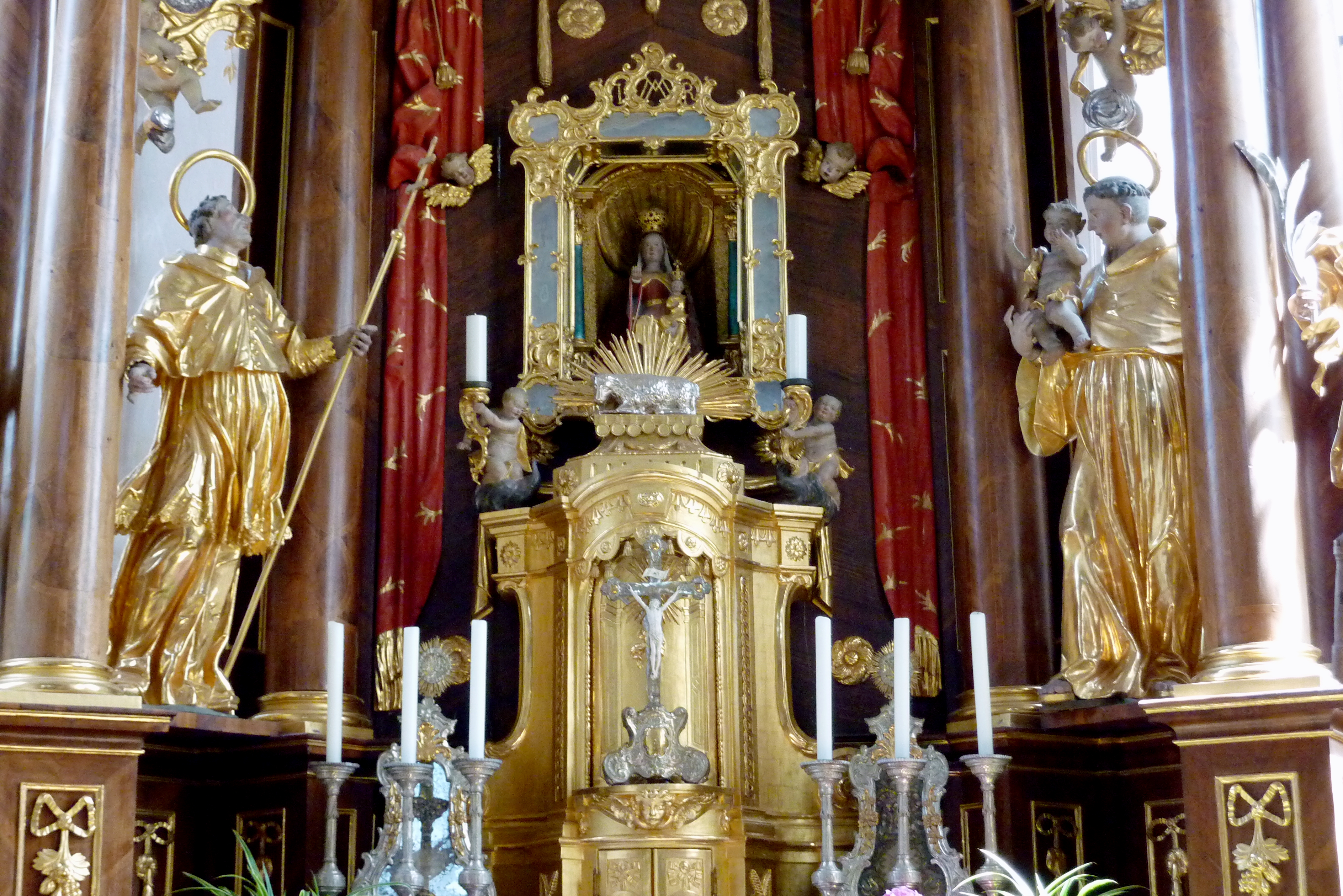 Katholische Wallfahrtskirche Mariä Himmelfahrt in Buggenhofen, einem Ortsteil von Bissingen im Landkreis Dillingen an der Donau (Bayern), Hauptaltar mit Gnadenbild aus der 2. Hälfte des 17. Jahrhunderts (Kopie nach dem Vorbild aus der Zeit um 1400) und den Skulpturen von Karl Borromäus (links) und Antonius von Padua (rechts)